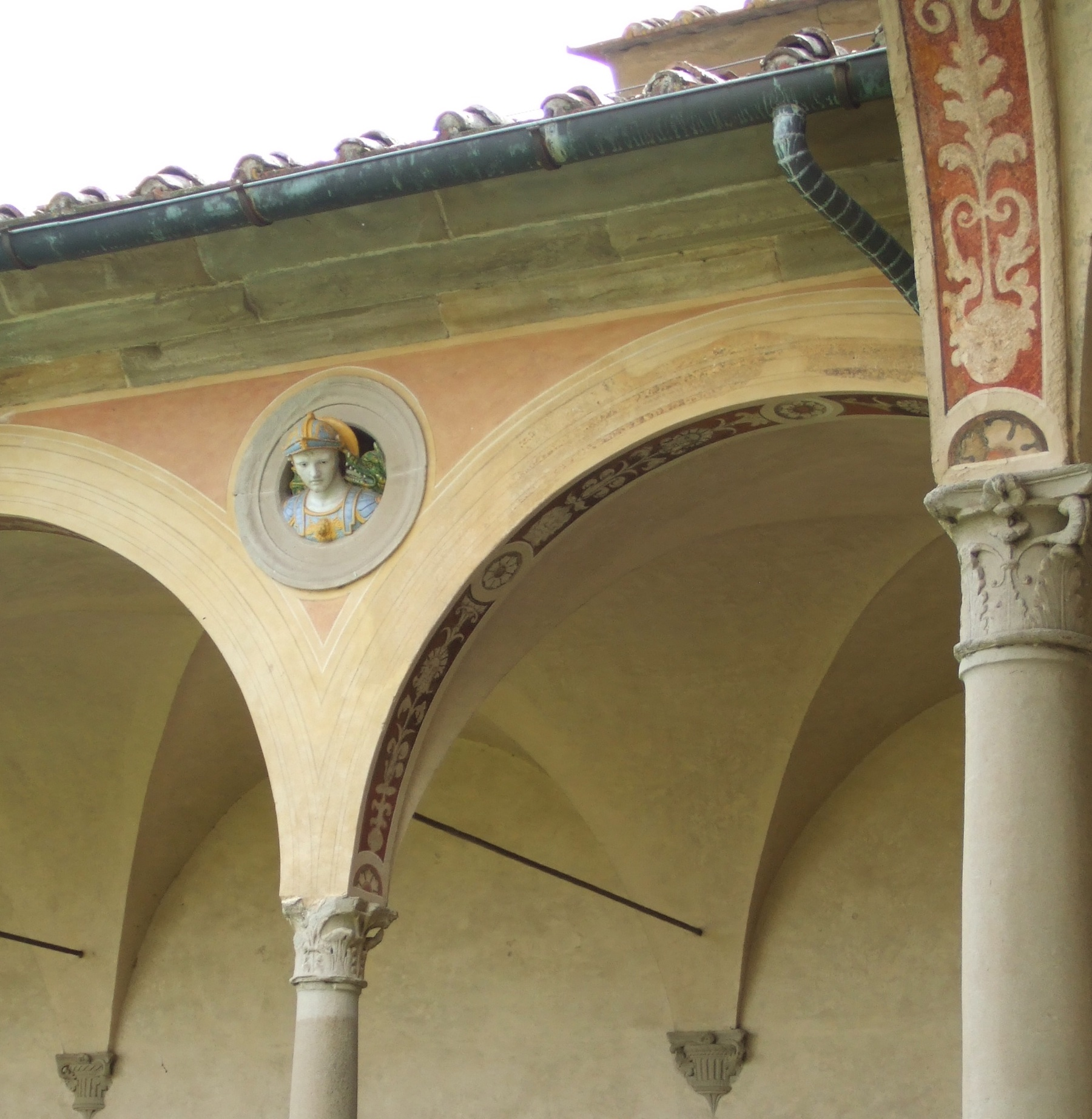 Médaillon en terracotta invetriata alla robianna du haut-cloître de la chartreuse de Galluzzo - Florence